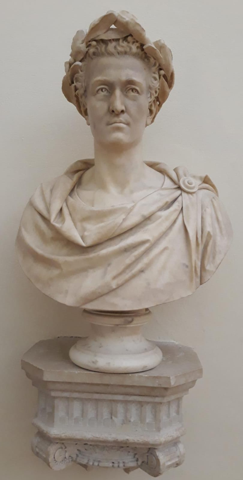 Busto di Catullo